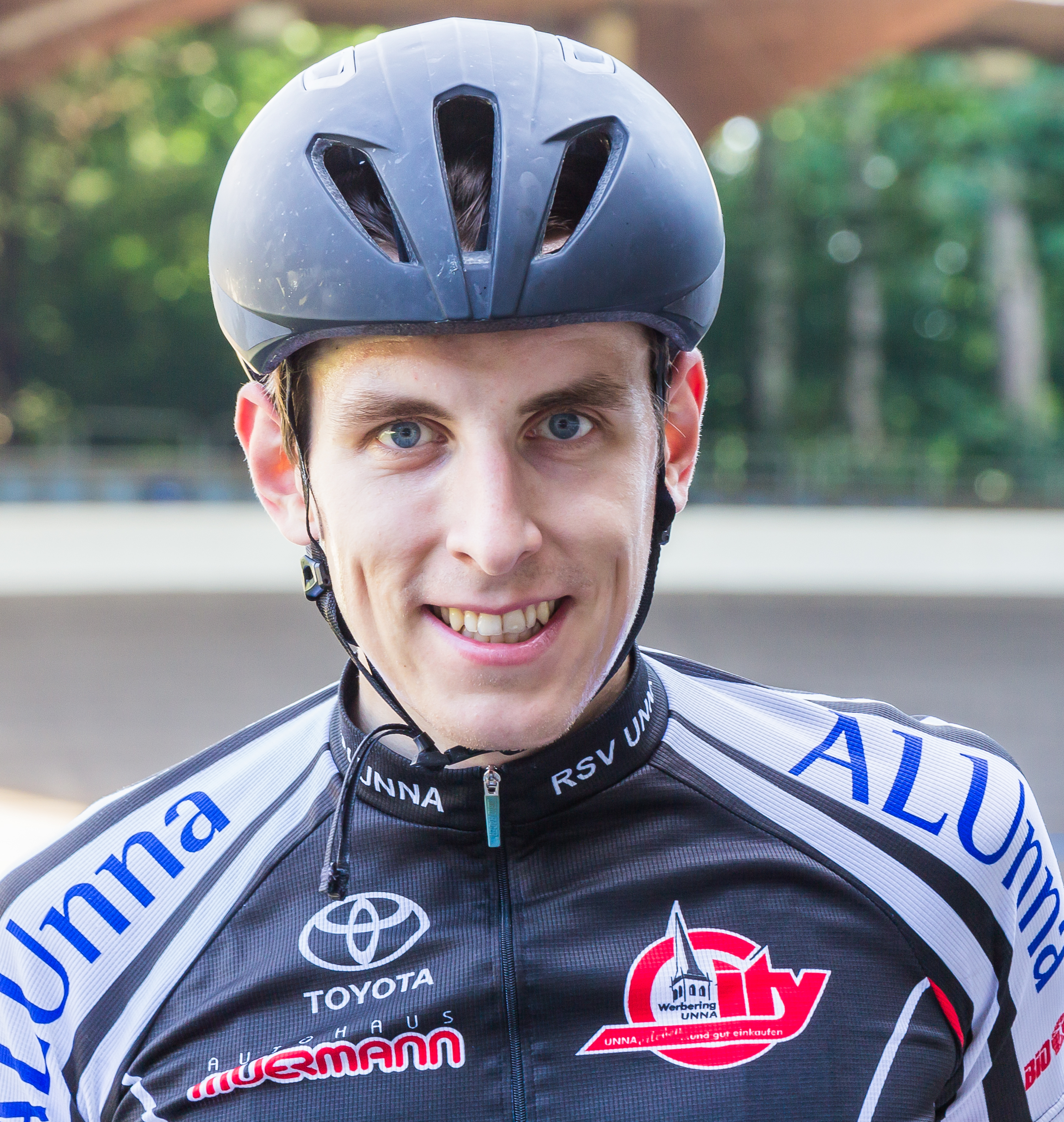 Justin Wolf im Radstadion Köln